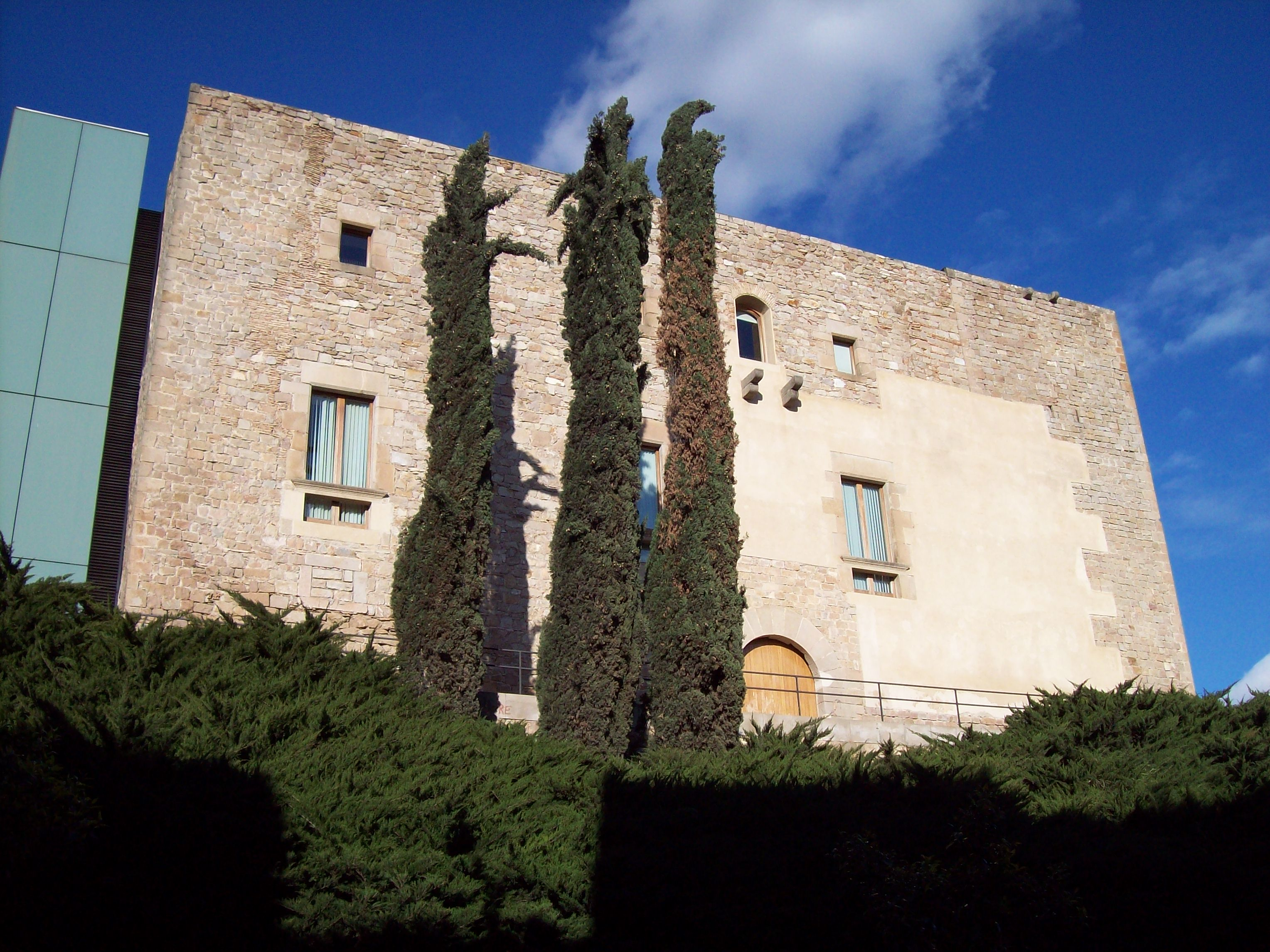 Castillo de Cornellà de Llobregat (Siglo XI-XVII) / Cornellà de Llobregat's Castle (XI-XVII century)